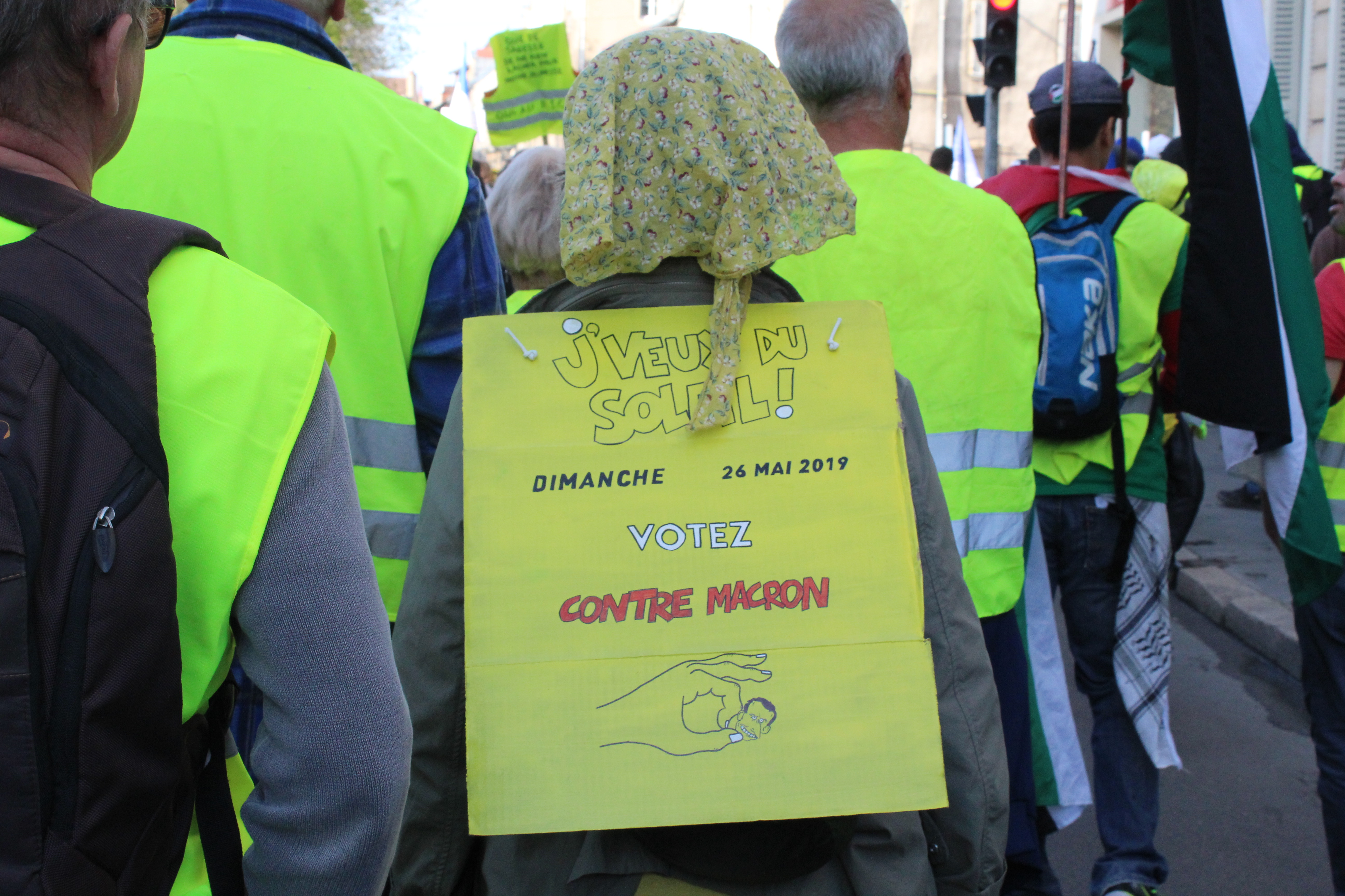 Manifestante faisant référence au documentaire de Gilles Perret et de François Ruffin "J'veux du soleil" lors de l'acte XX des Gilets jaunes à Dijon (Côte-d'Or). Il est écrit sur sa pancarte : "J'veux du soleil ! Dimanche 26 mai votez contre Macron."